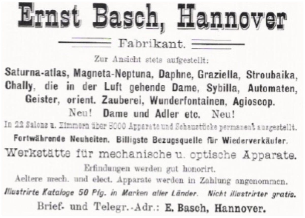 Verkaufsanzeige der Zauberhandlung von Ernst Basch